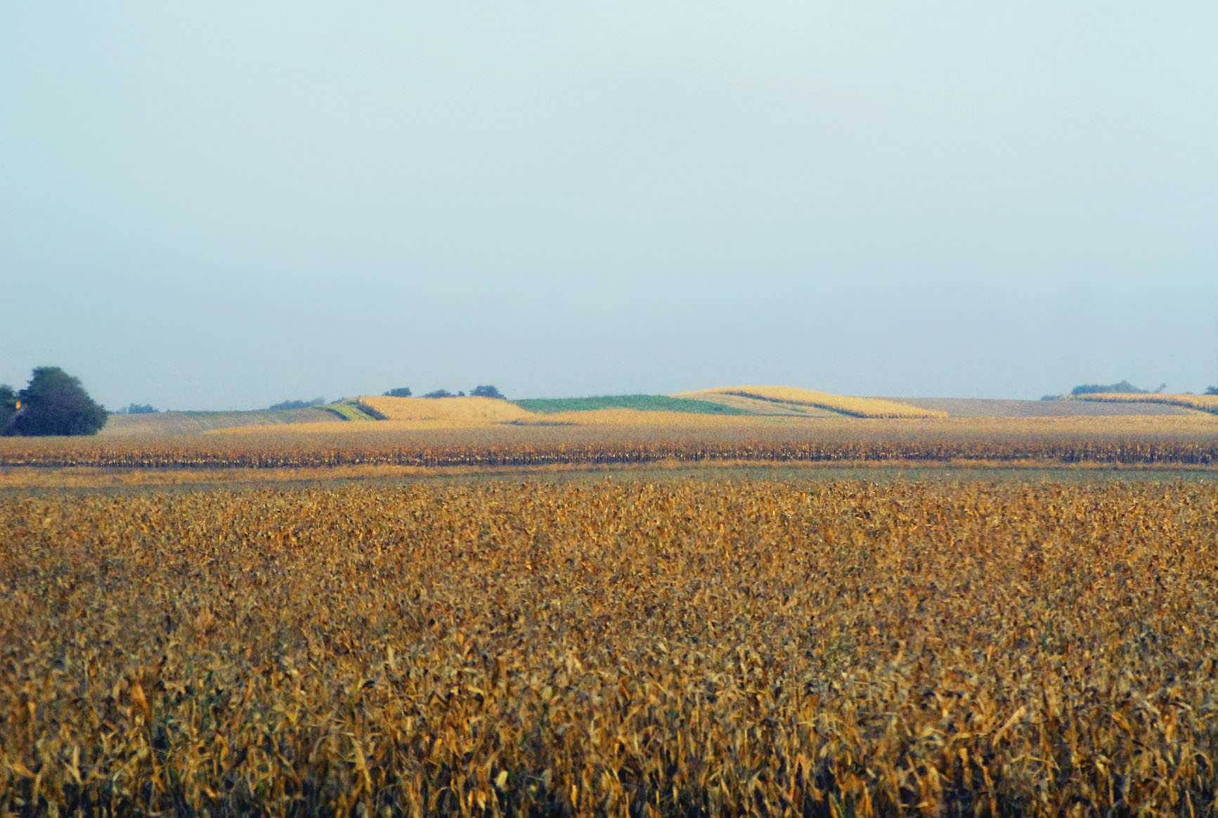 Brežuljci i "doline" Vojvođanskog mesta Doline, opština Kanjiža